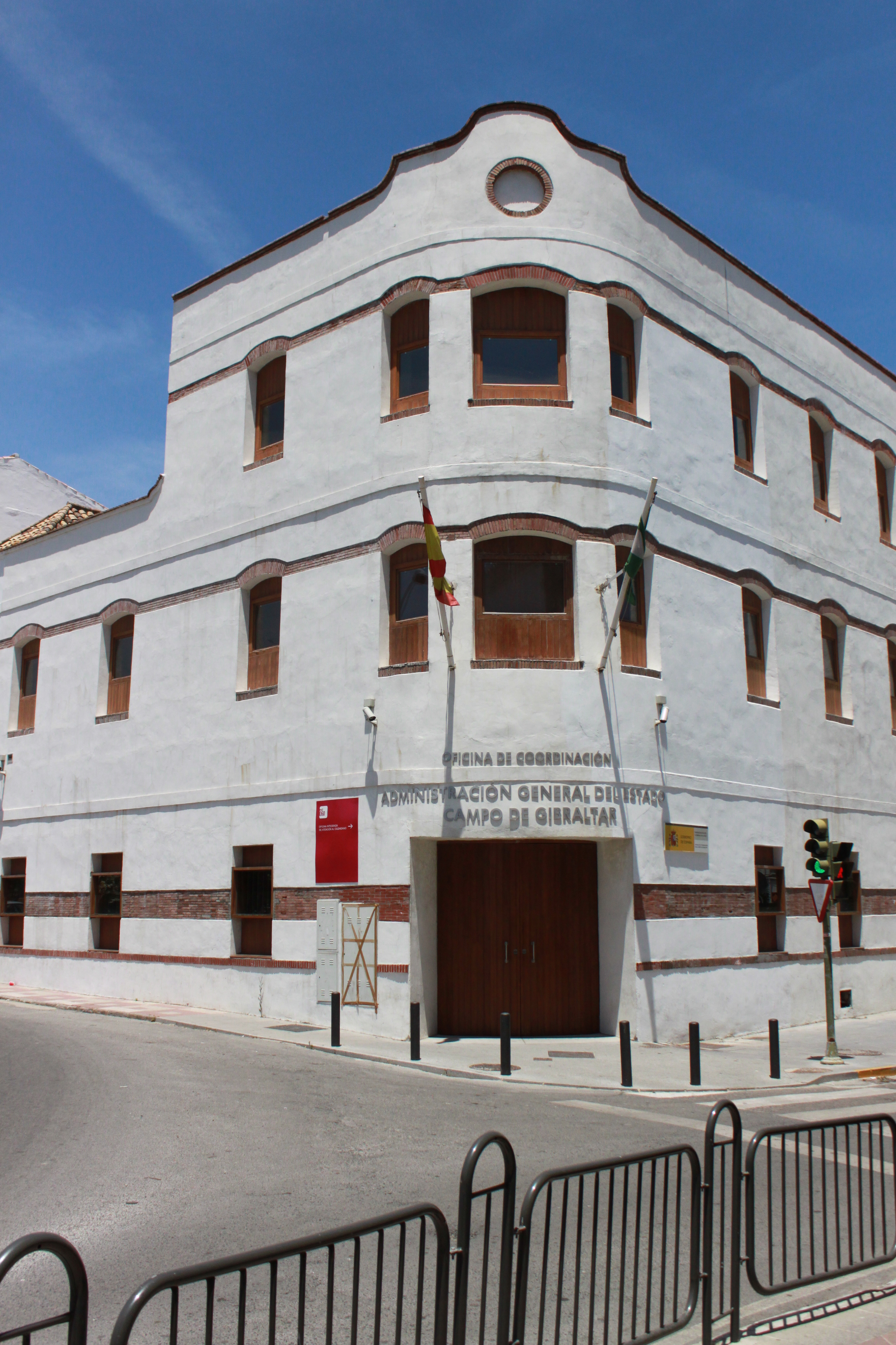 Administración General del Estado en el Campo de Gibraltar situada en la Plaza Juan de Lima de Algeciras, Andalucía, España.